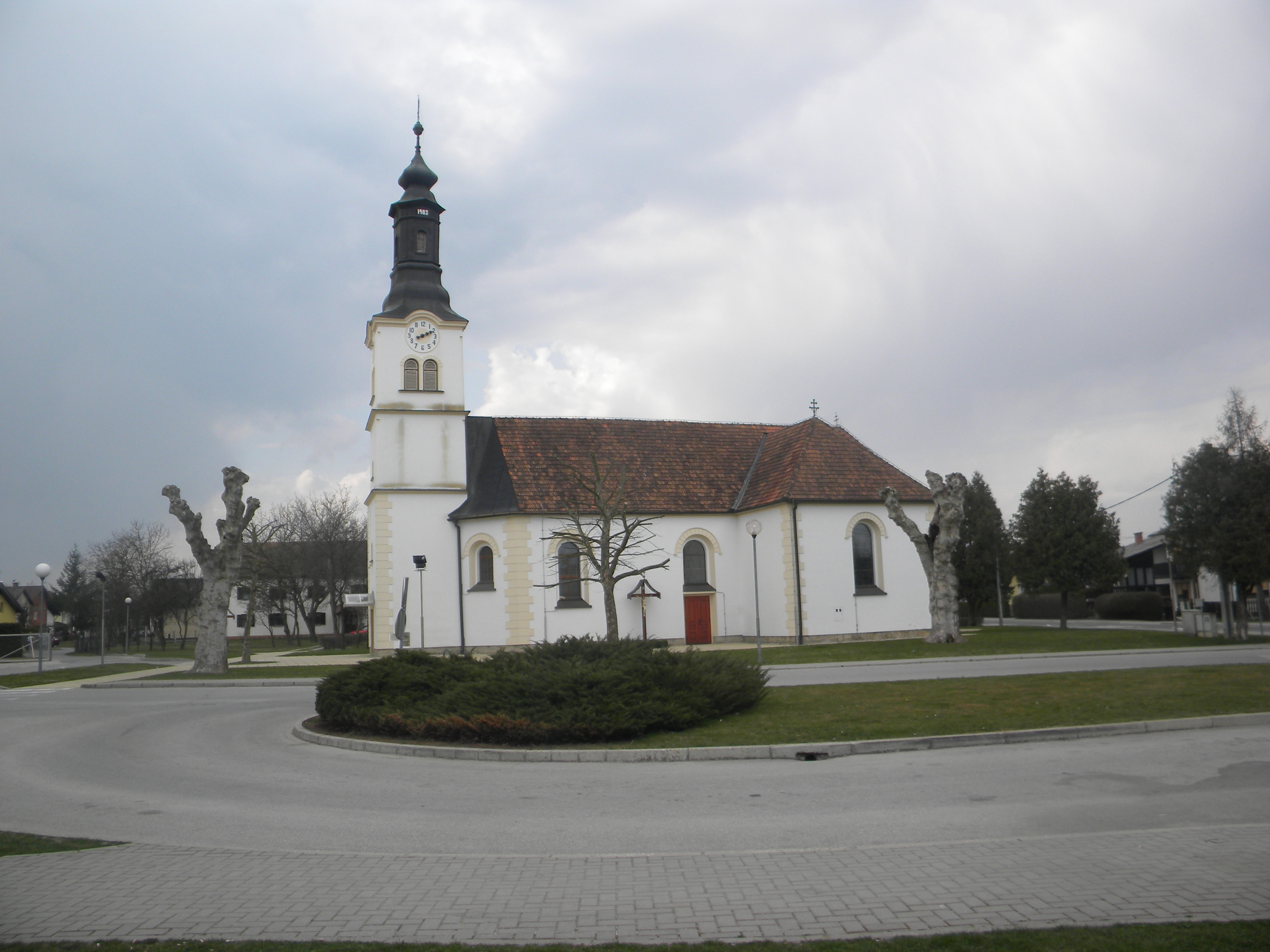 Cerkev sv jožefa v cankovi